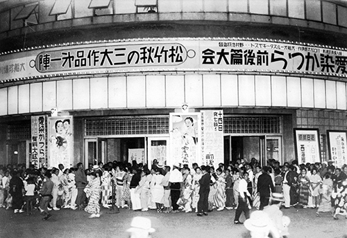 1938年の聚楽館の写真